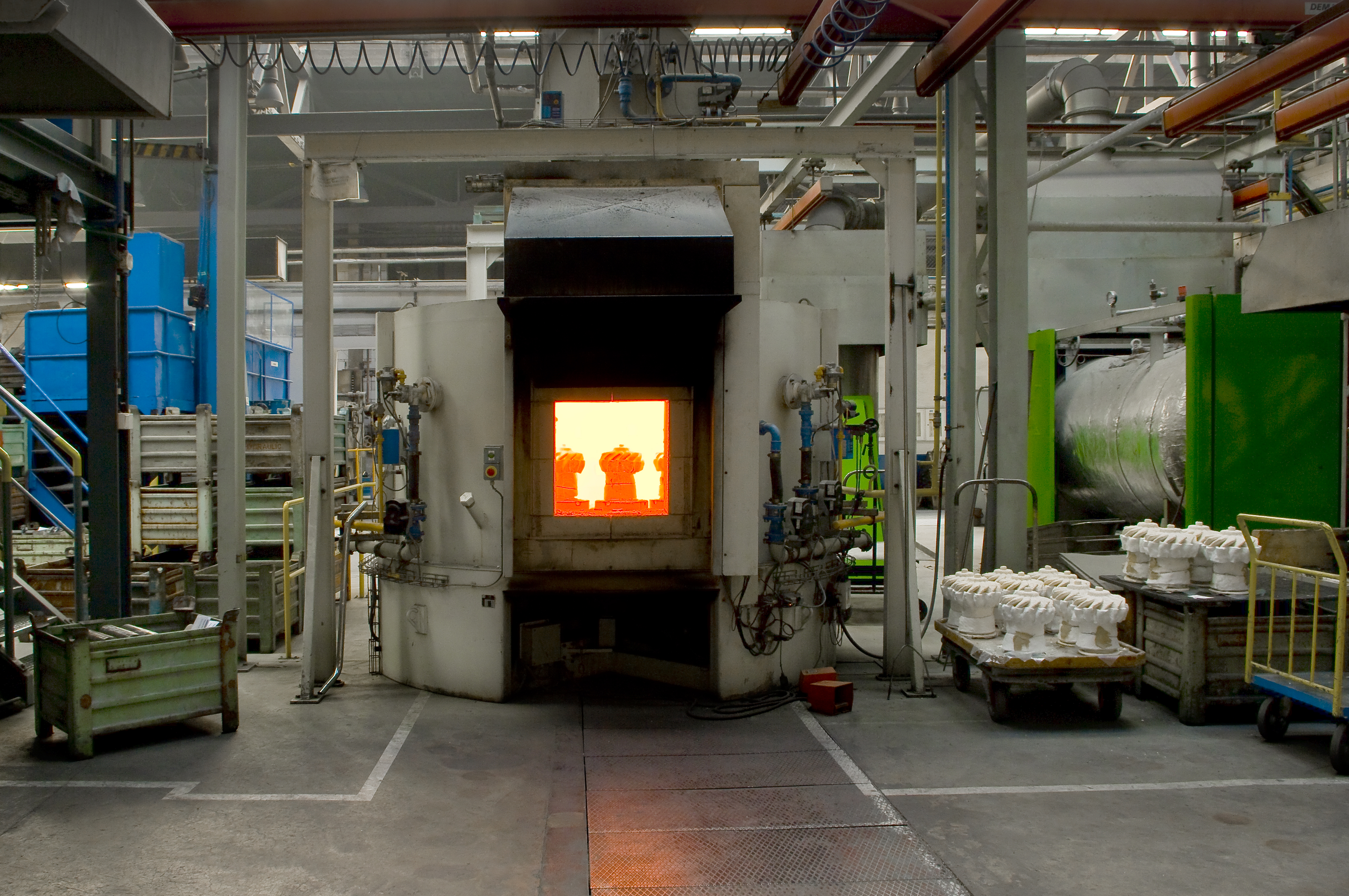 Pec - slévárna